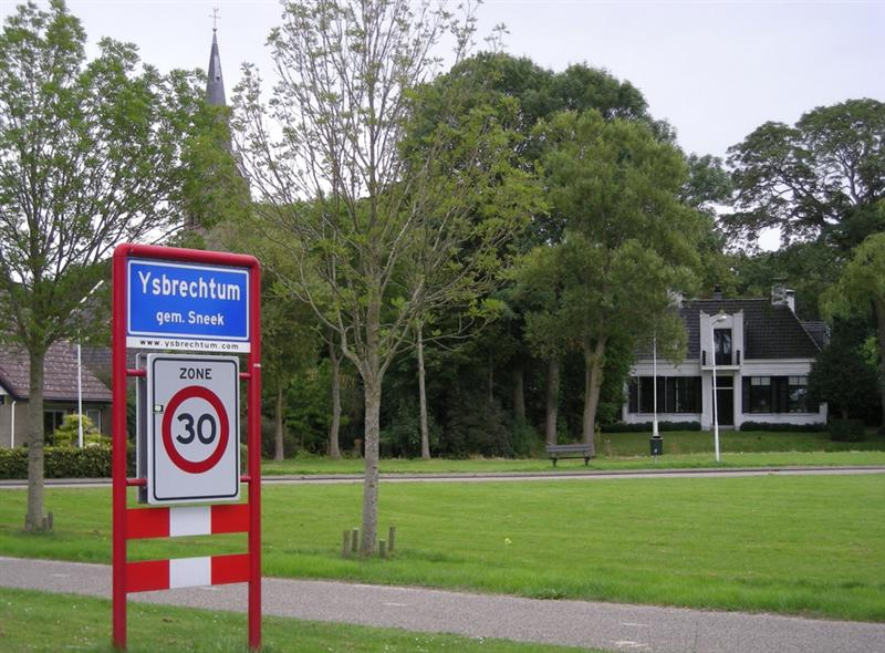 Ysbrechtum (officieel)